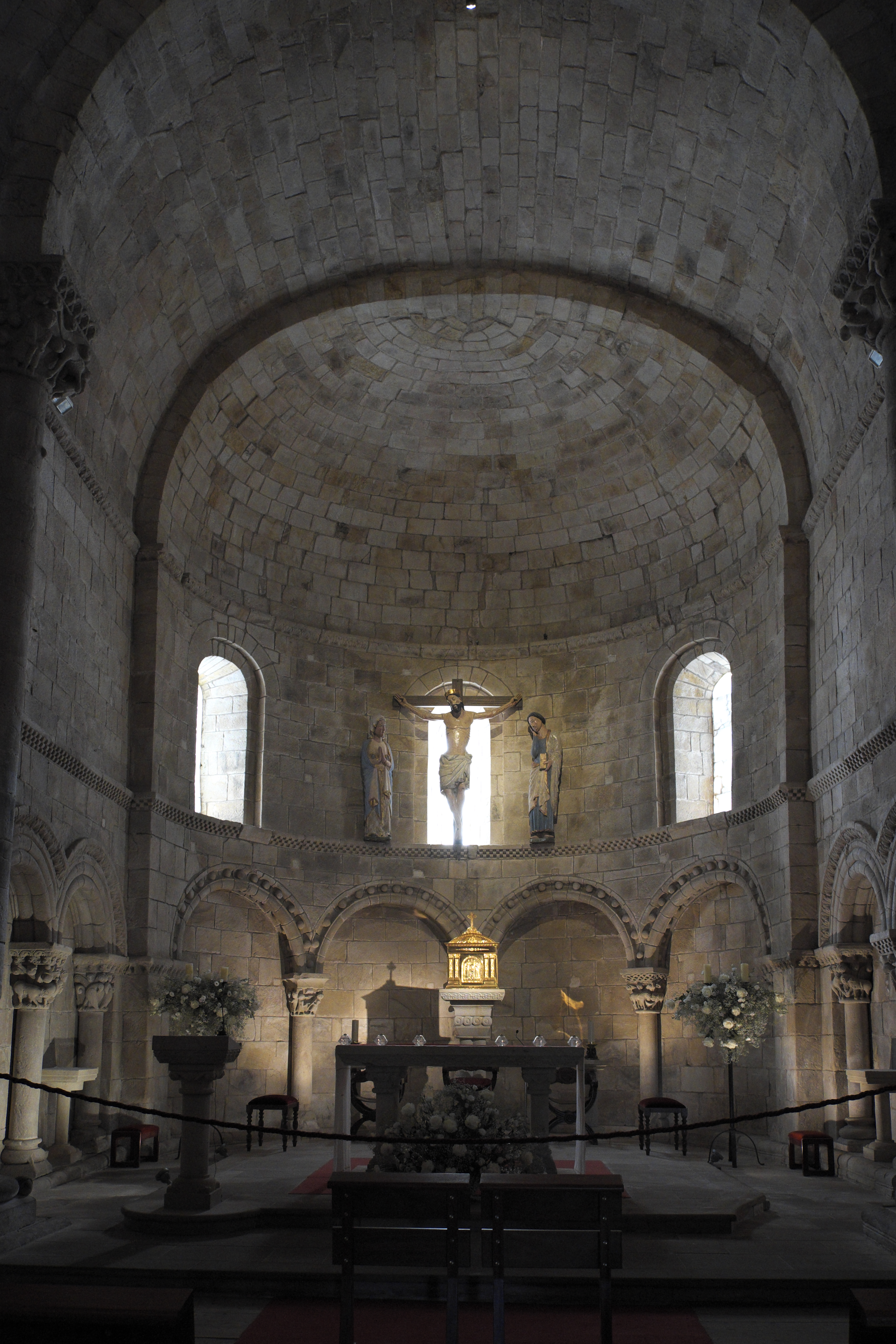 Ehemalige Benediktinerklosterkirche Colegiata de Santa Cruz in Castañeda in Kantabrien (Spanien), Innenraum mit Blick zum Chor